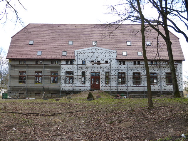 Ehemaliges Gutshaus